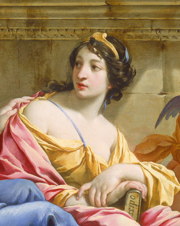 Detalhe da musa Callíope no quadro The Muses Urania and Calliope, oil on canvasmedium QS:P186,Q296955;P186,Q12321255,P518,Q861259